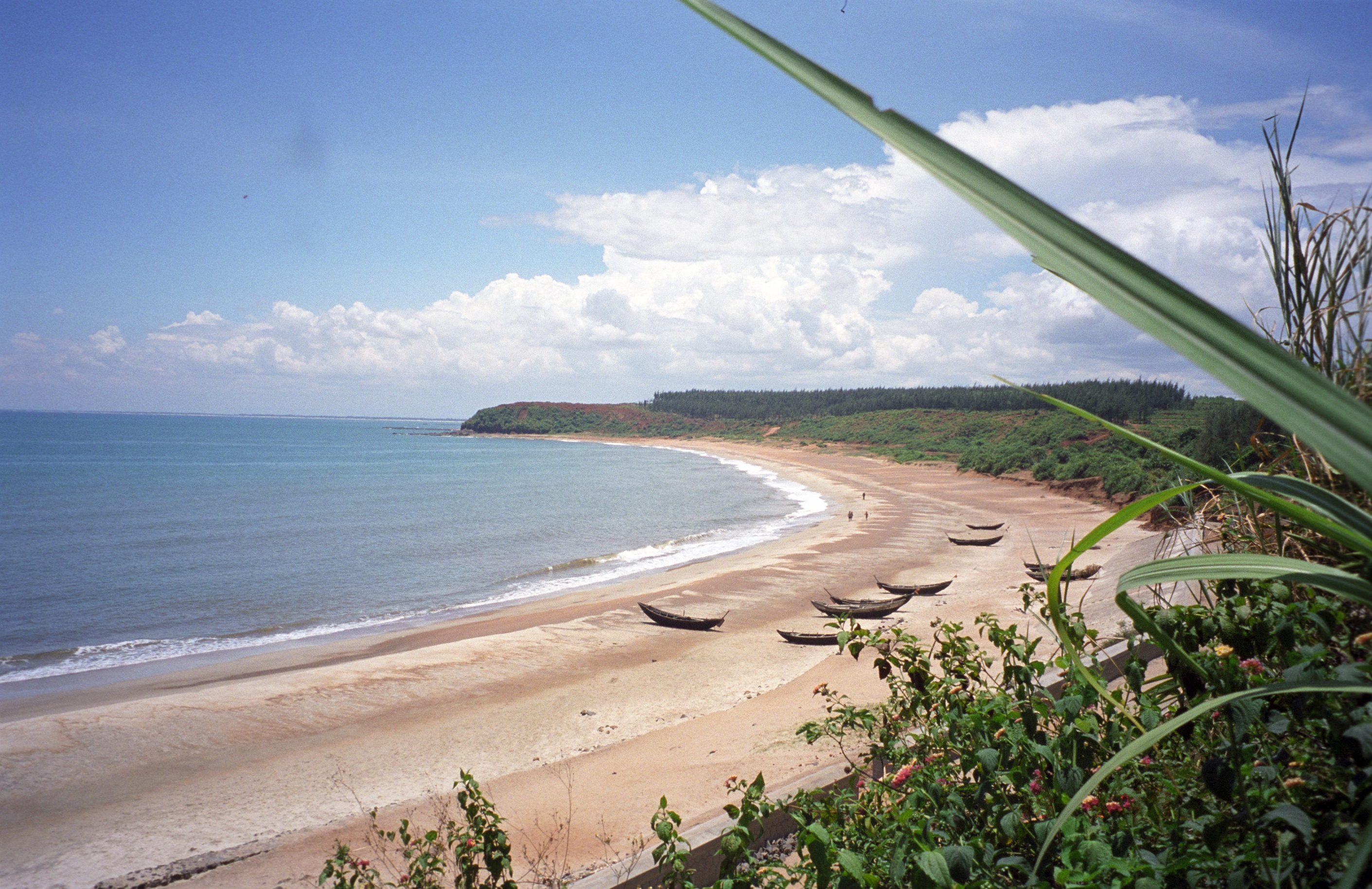 Cua Tung Beach